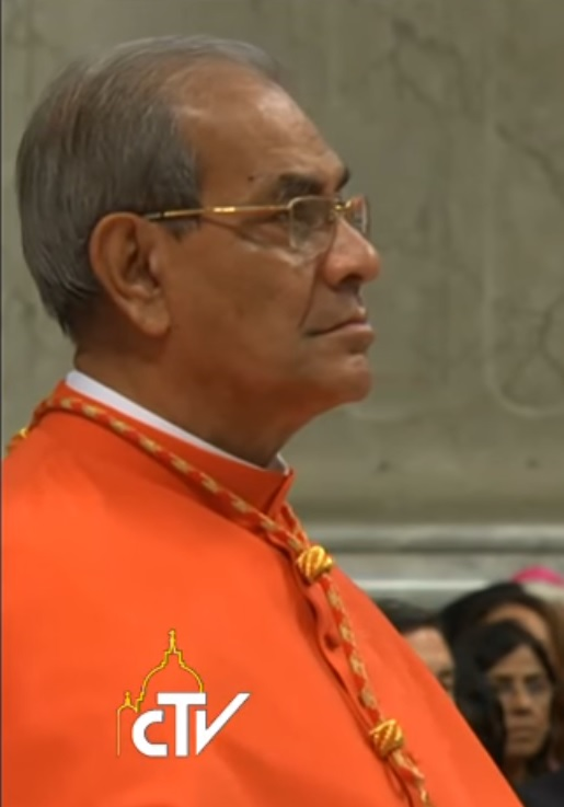 Patrick D’Rozario, CSC bíboros